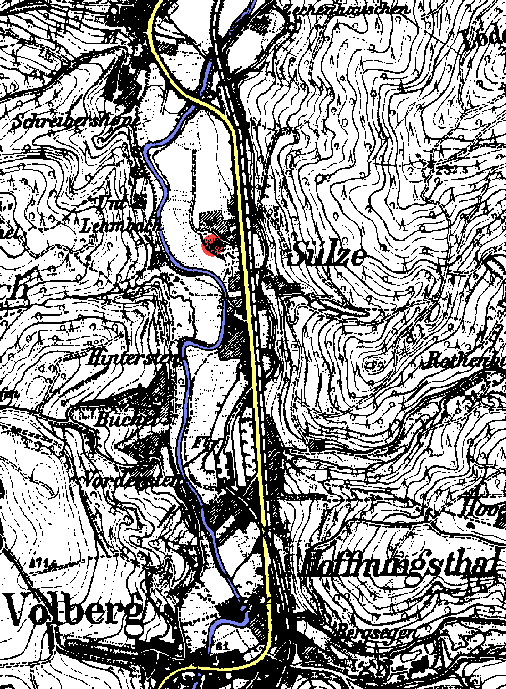 Karte von Hoffnungsthal/Rösrath/Köln um 1900. Siehe Artikel Burg Obersülz